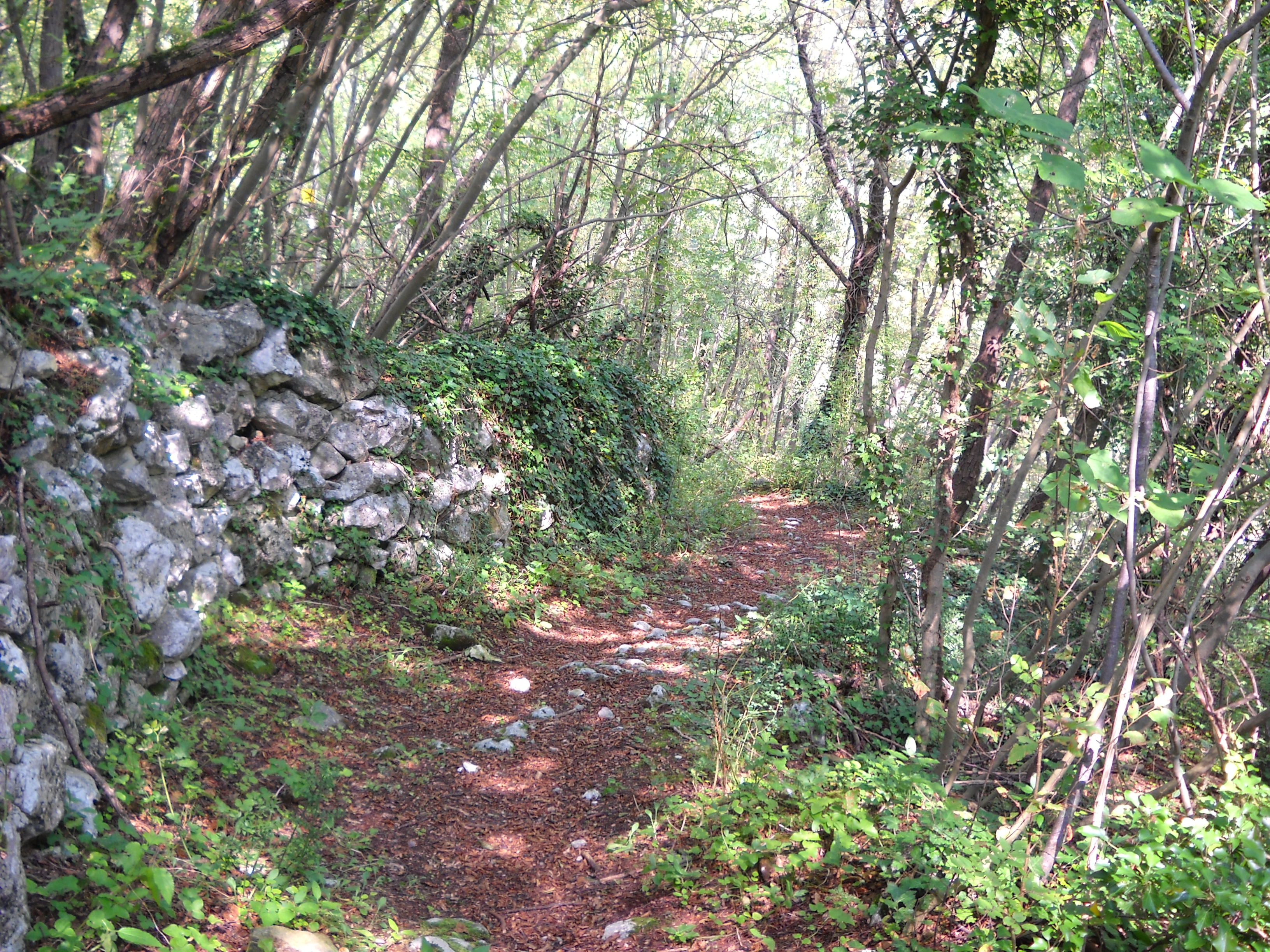 Vajo Galina This is a photo of a monument which is part of cultural heritage of Italy. The authorisation for taking photos of this object was provided by the World Wide Fund for Nature Italy.